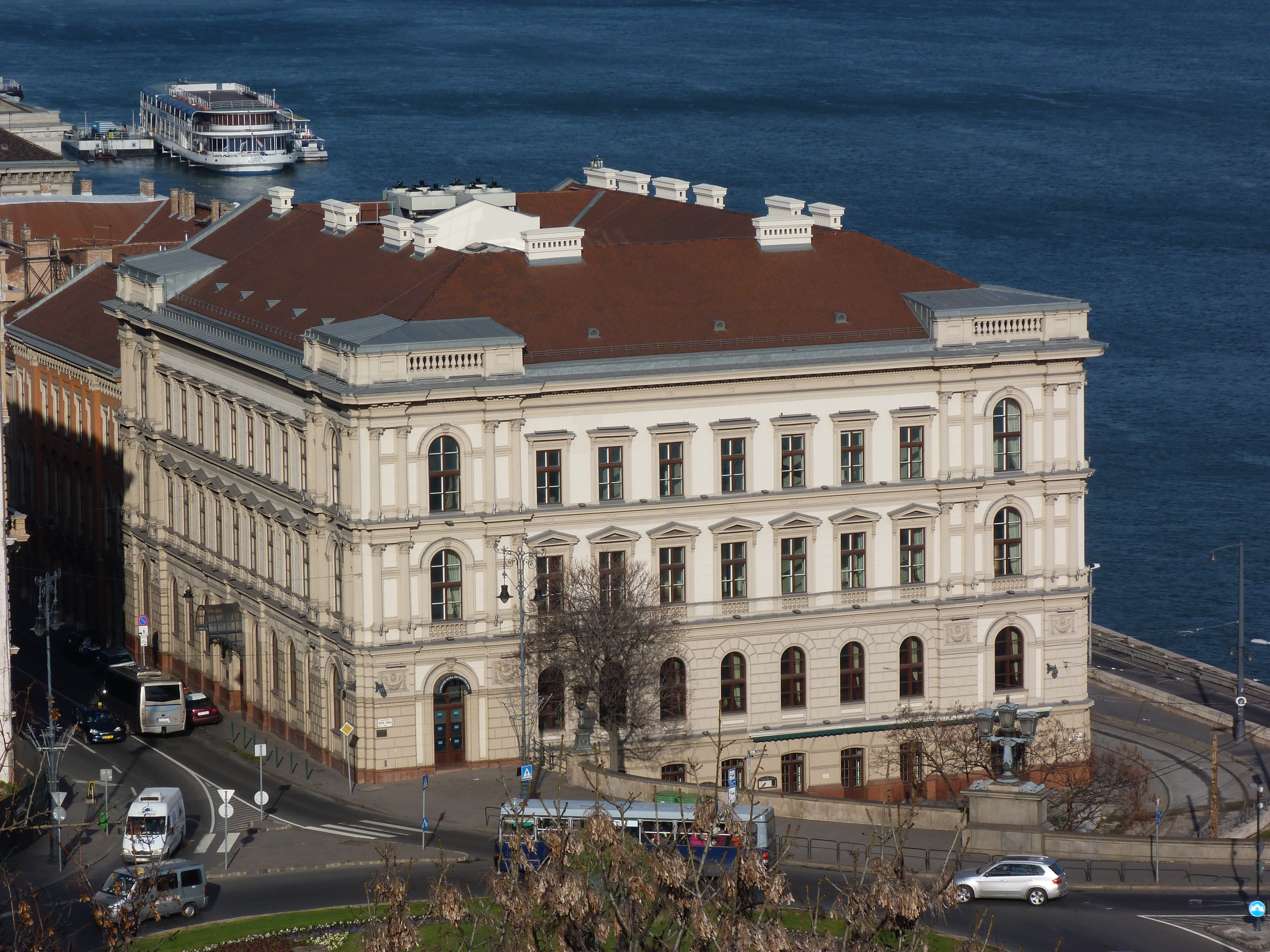 Lánchíd Palota. Kétemeletes, háromhomlokzatos, neoreneszánsz ház, Ybl Miklós, 1867-1869. Műemléki azonosító: 33. - Budapest I. , Fő utca 1., Bem József rakpart 1. - Korábban megjelent CC alatt a Metapolisz DVD sorozatban. This is a photo of a monument in Hungary. Identifier: 33